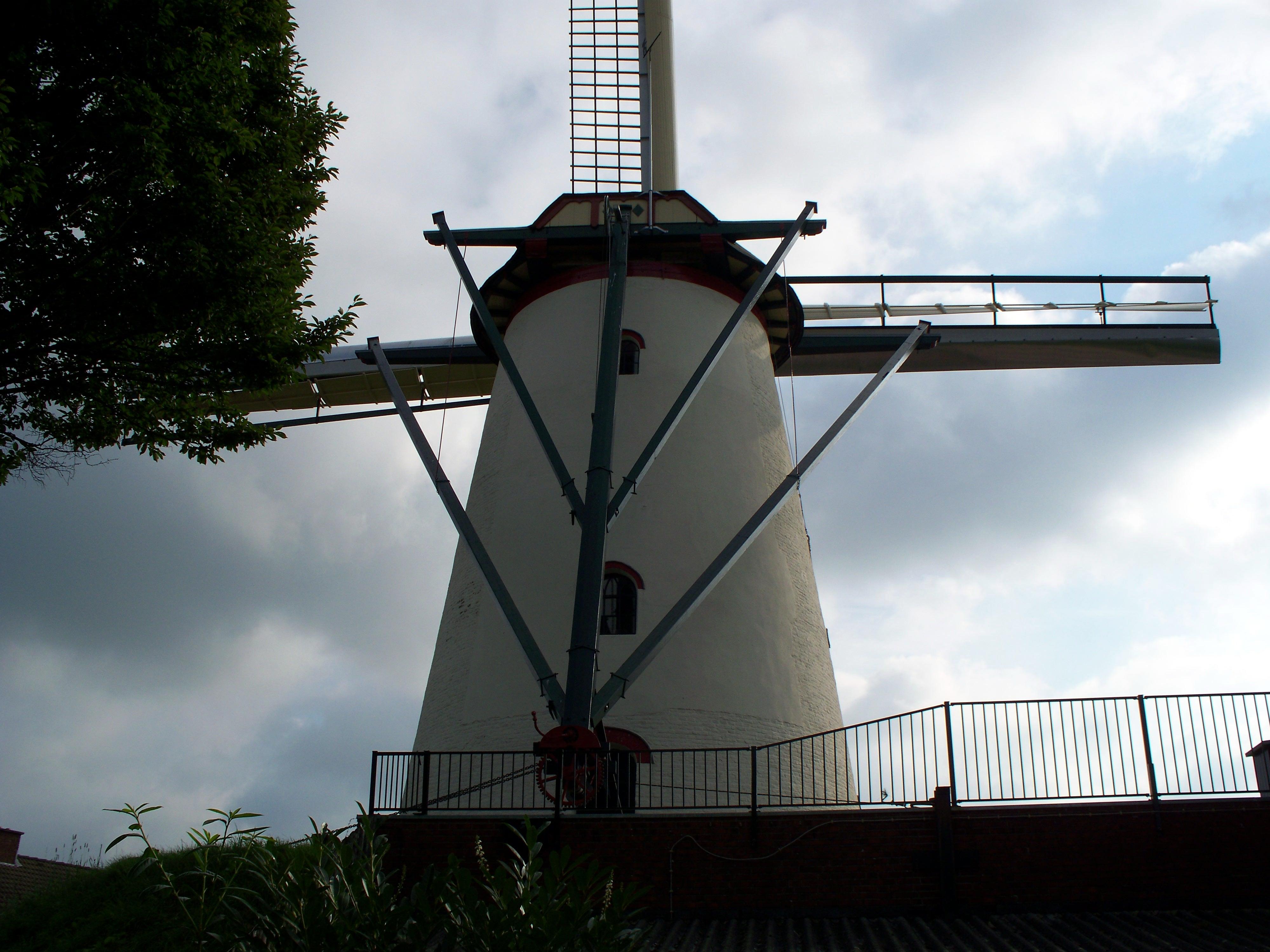 Molen Sint Martinus te Didam, Wilhelminastraat